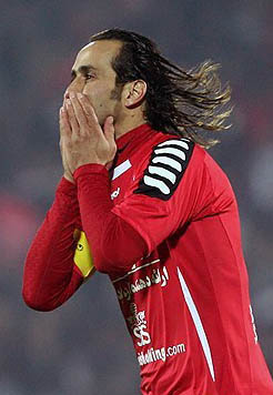 علی کریمی در دیدار بین تیم‌های فوتبال پرسپولیس تهران و صنعت نفت آبادان - پرسپولیس ۲ - صنعت نفت آبادان ۲